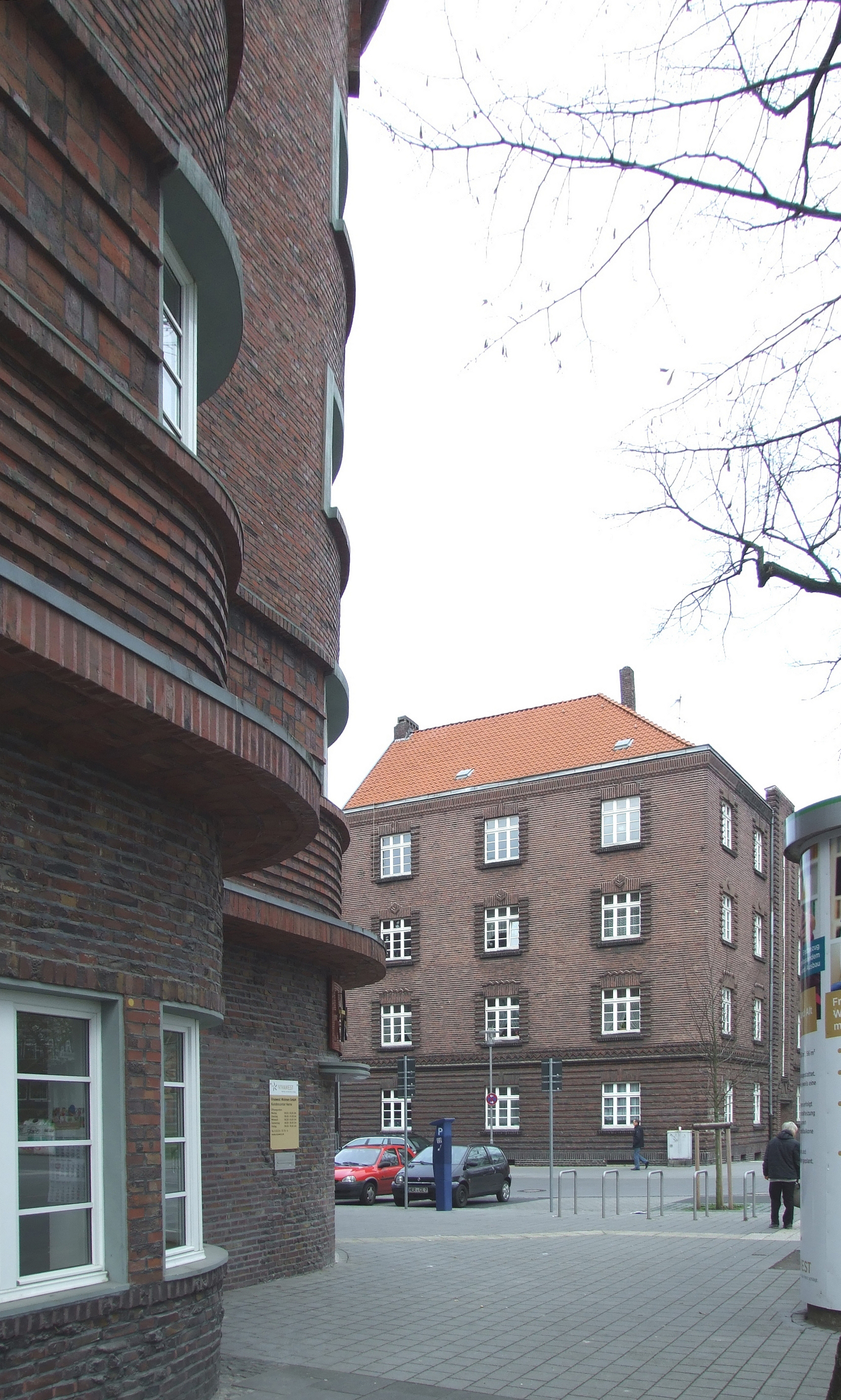 Herne, Wibbelstraße 5 Blick vom Roten Block aus